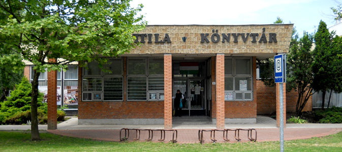 Makói József Attila Könyvtár kívülről